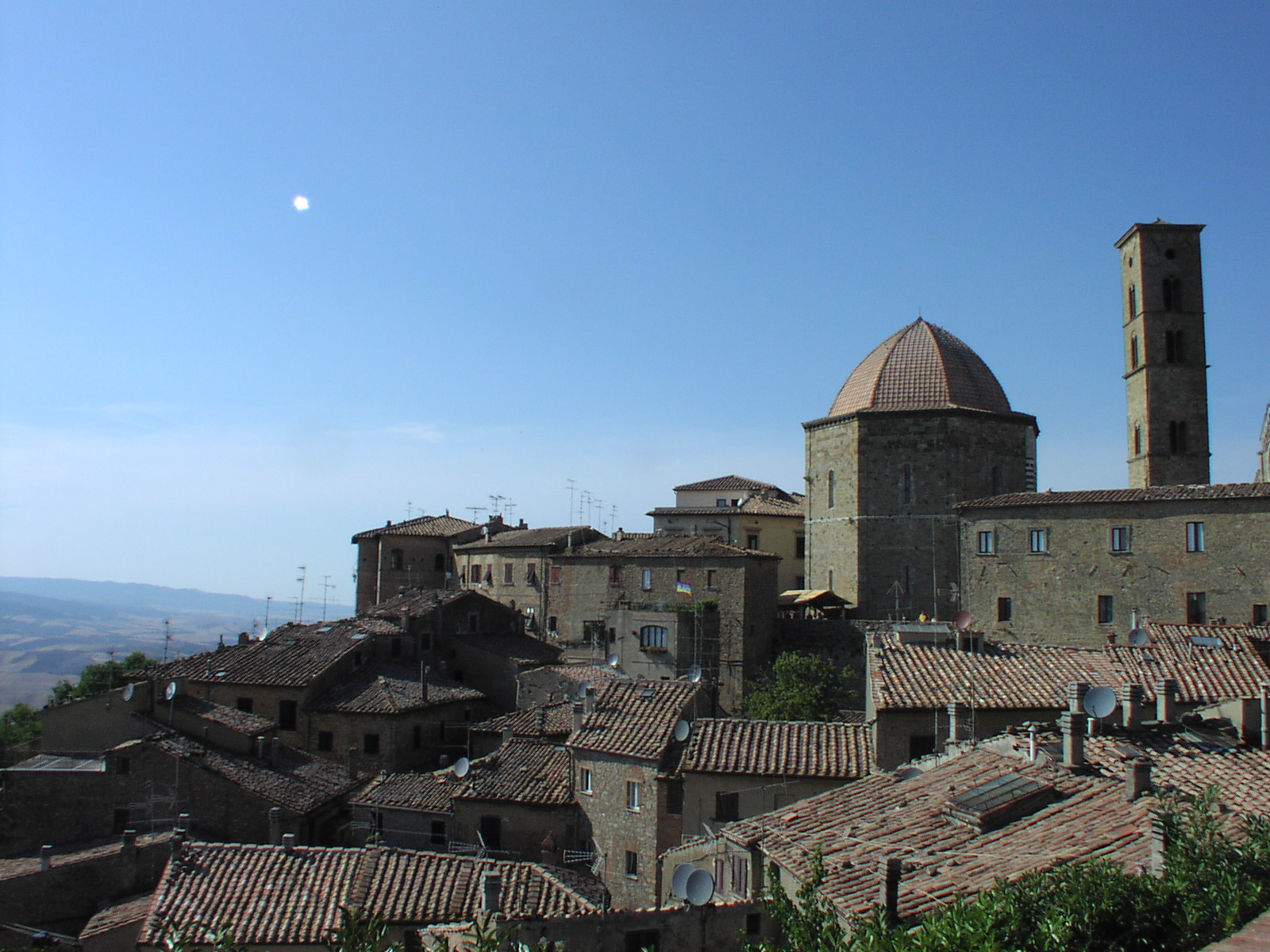 Volterra, Toscana, Italia